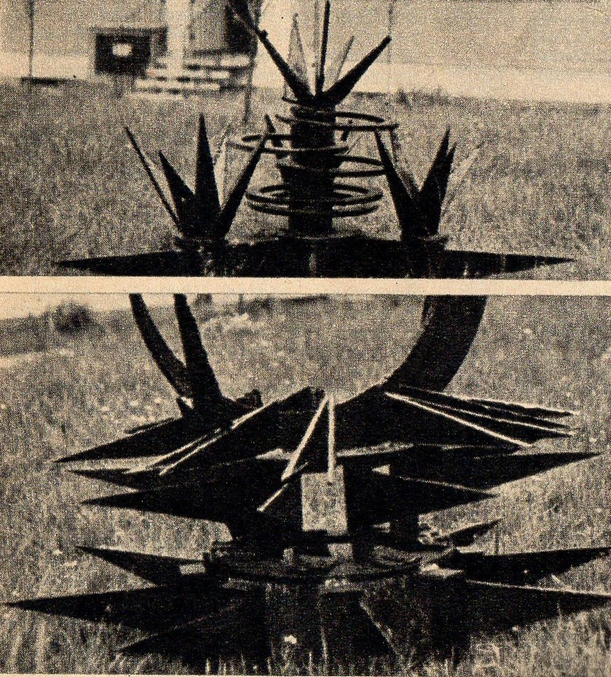 Rzeźby na os. Zatrasie (Warszawa) z lat 60. XX w. Autor: Tadeusz Zarzycki.